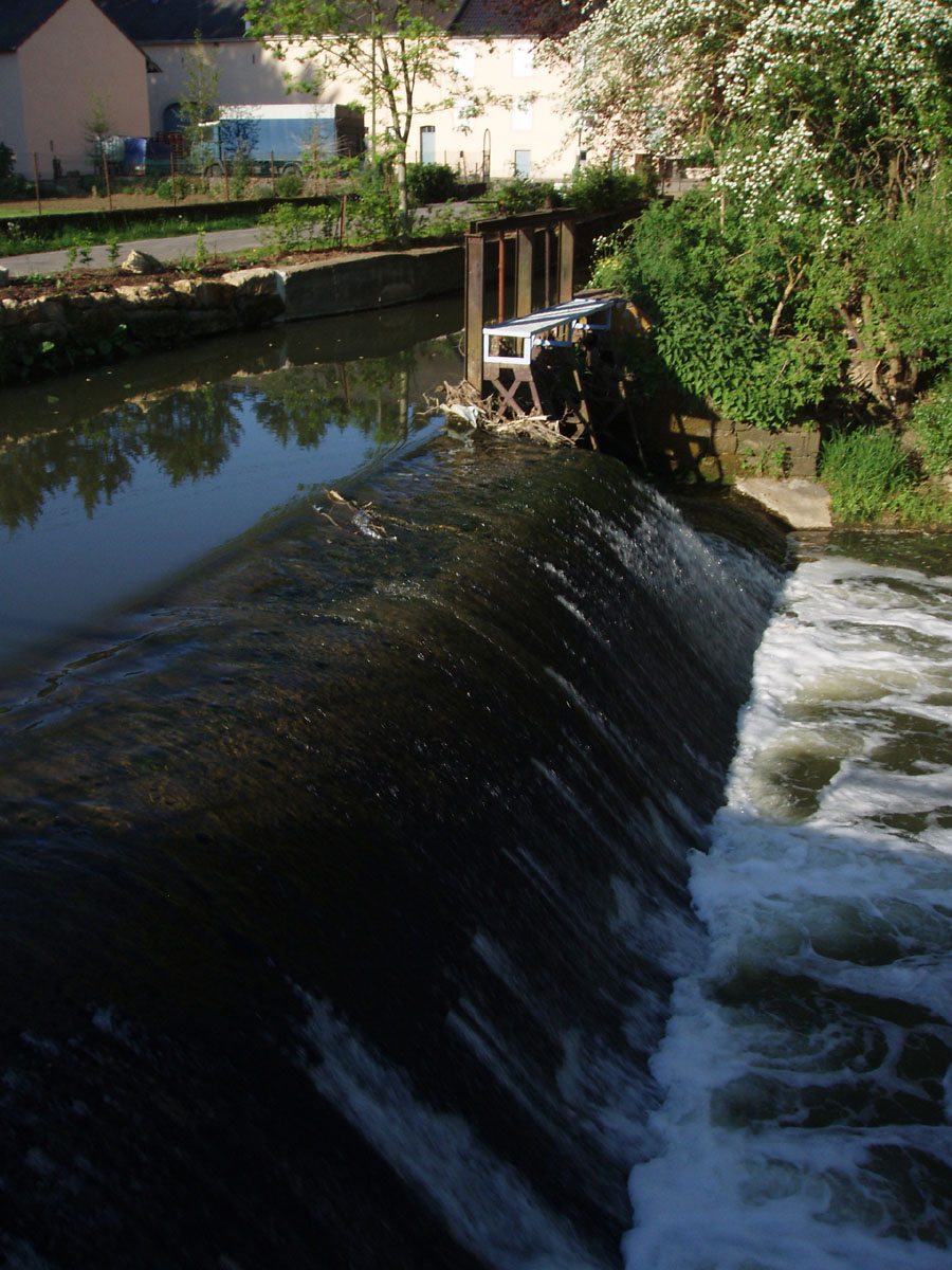 D'Uelzecht leeft iwwert d'Wier vun der Hëncherenger Millen.